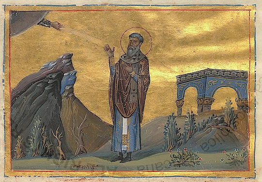 Преподобный Евмений, епископ Гортинский Константинополь. 985 г. Миниатюра Минология Василия II. Ватиканская библиотека. Рим.